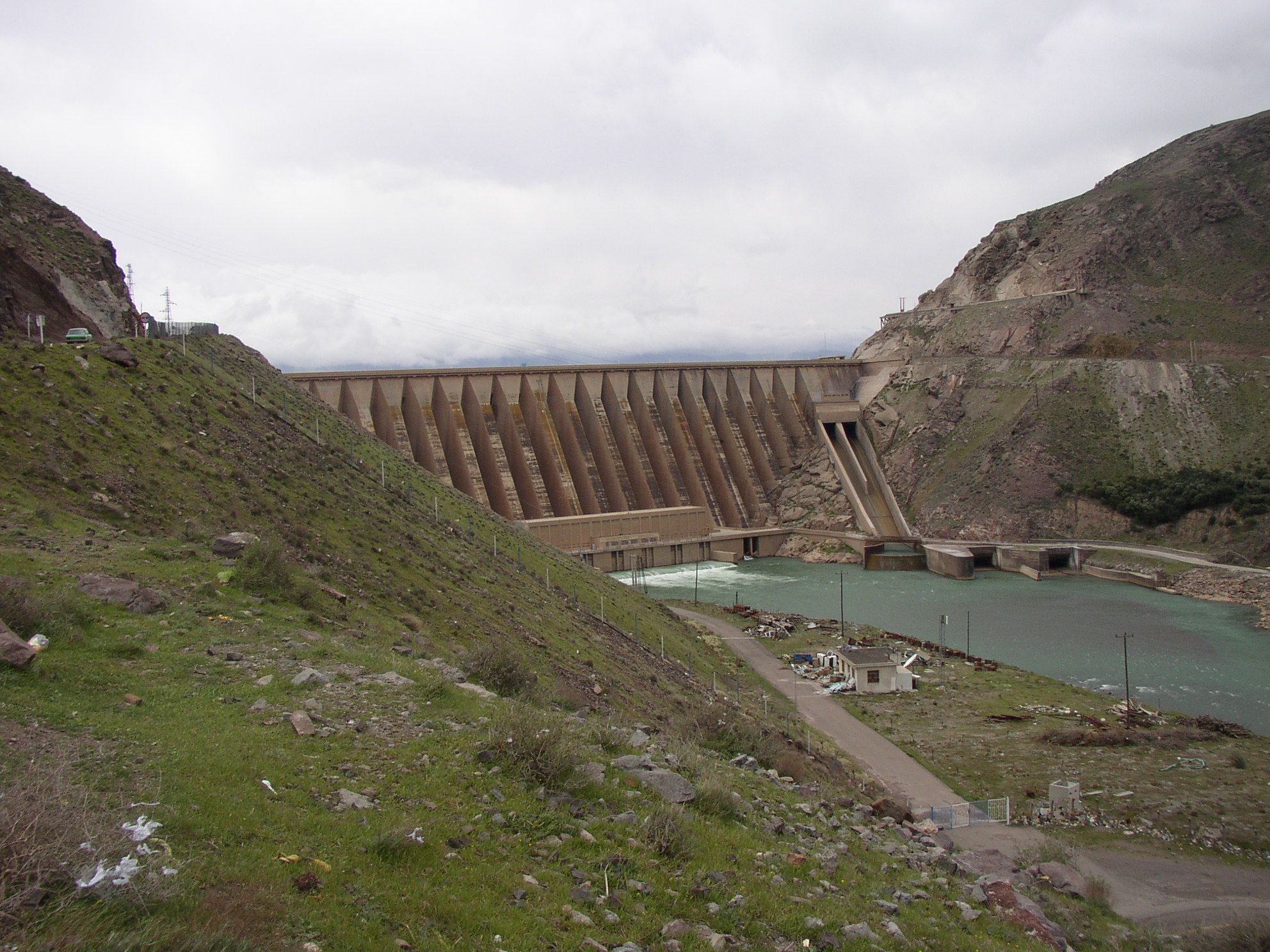 Barrage de SefidRoud